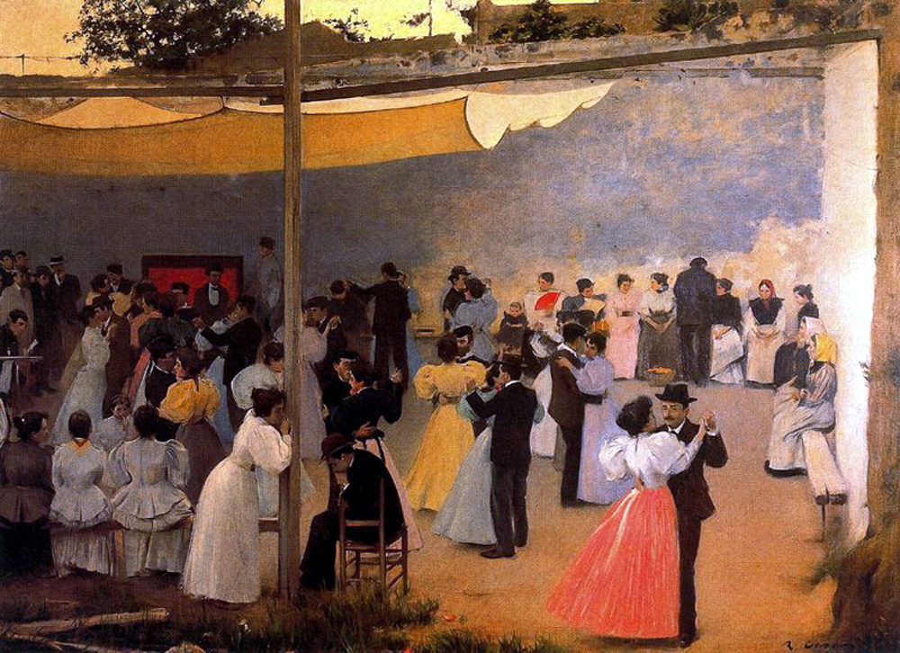 Baile